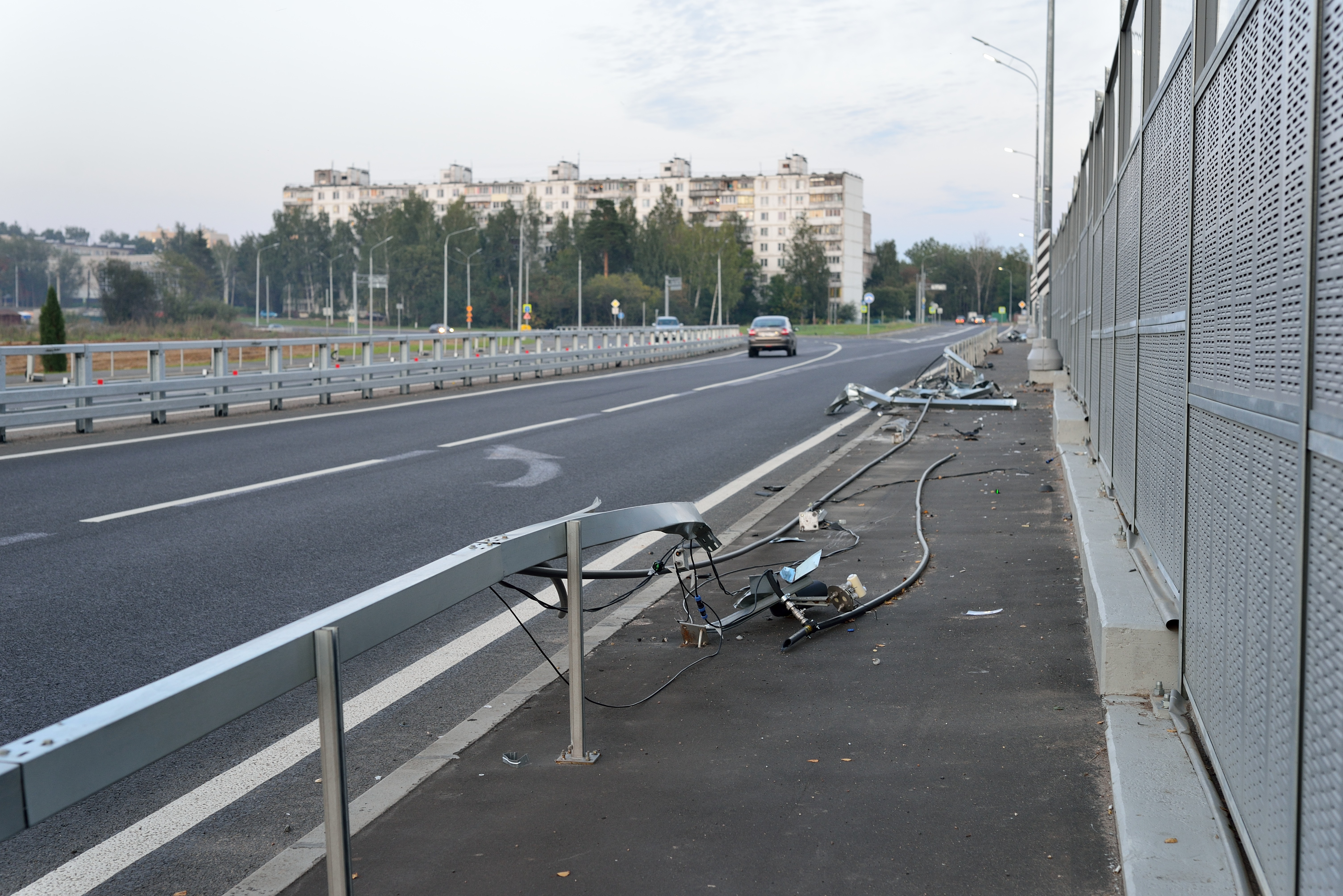 Шумозащитный экран скрывает видимость на развороте скоростном участке путепровода - в результате аварии